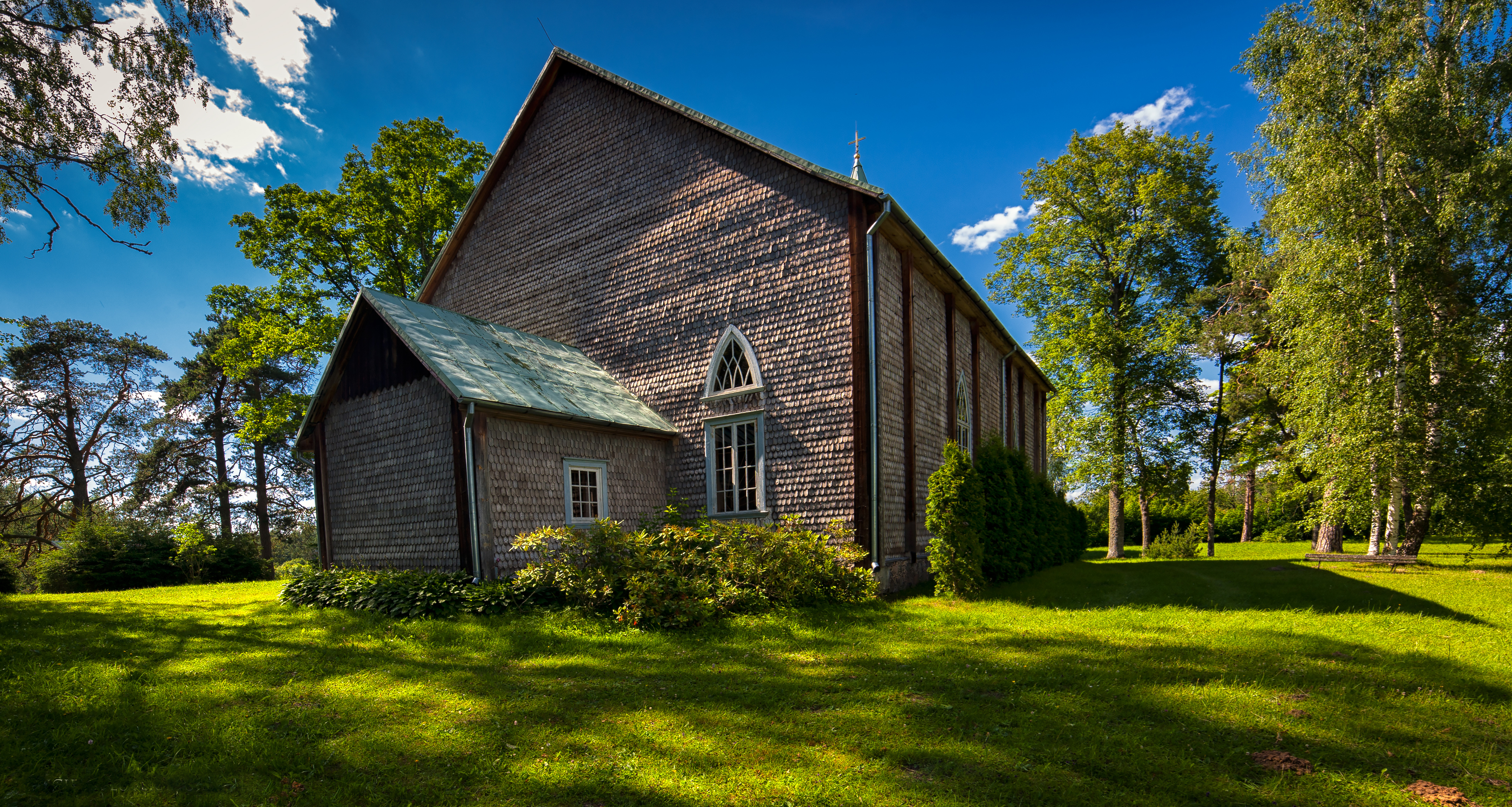 Vijciema luterāņu baznīca, Vijciems